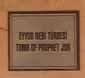 эйюбнеби